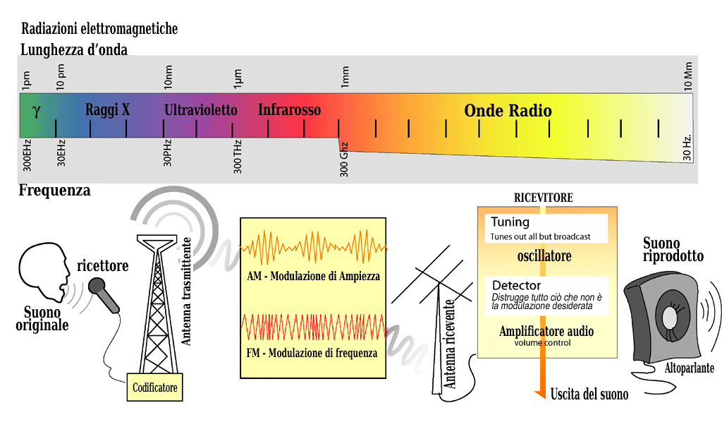 Diagramma di trasmissione radio, tradotto dall'inglese